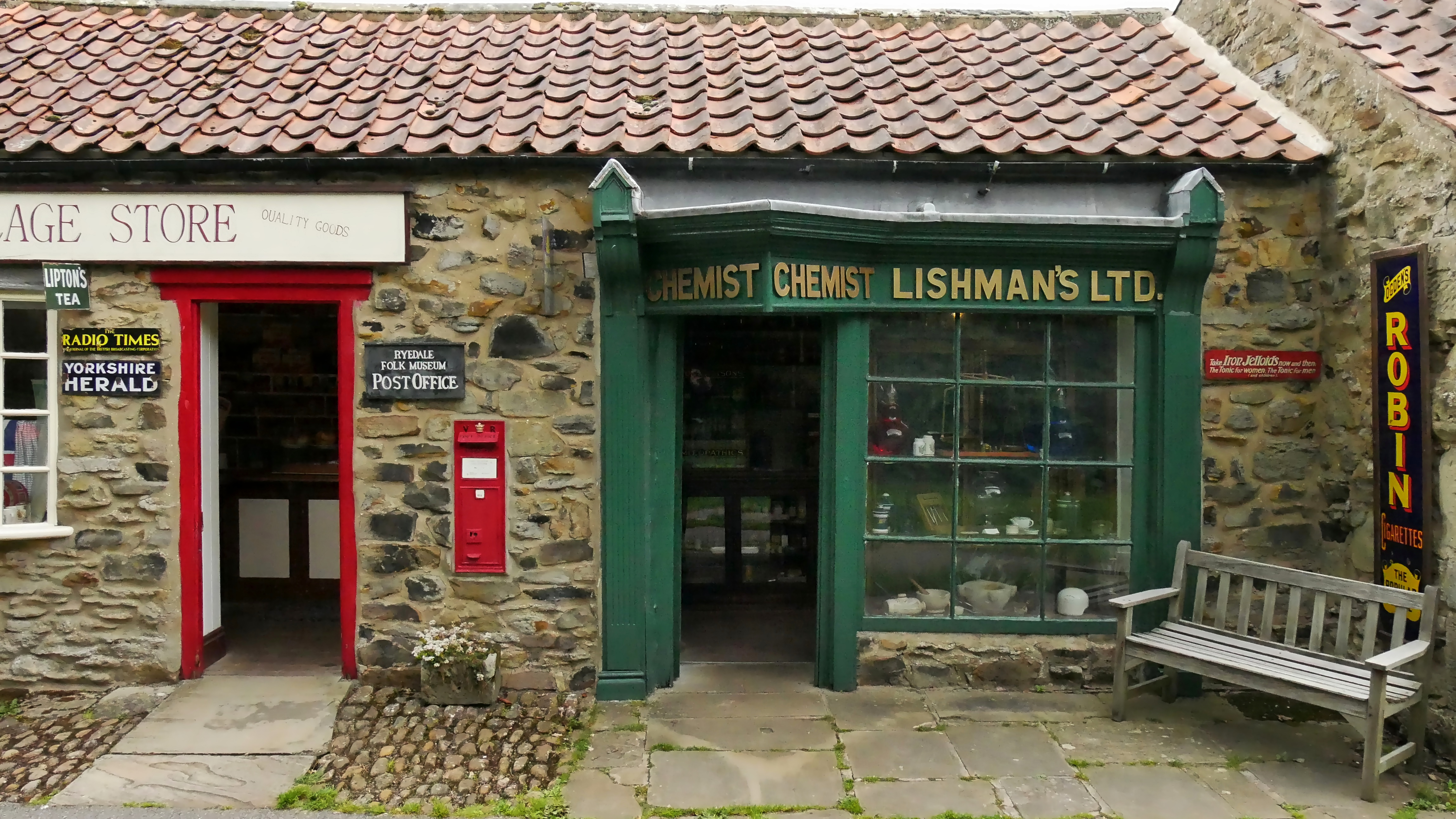 Ryedale Folk Museum - chemists